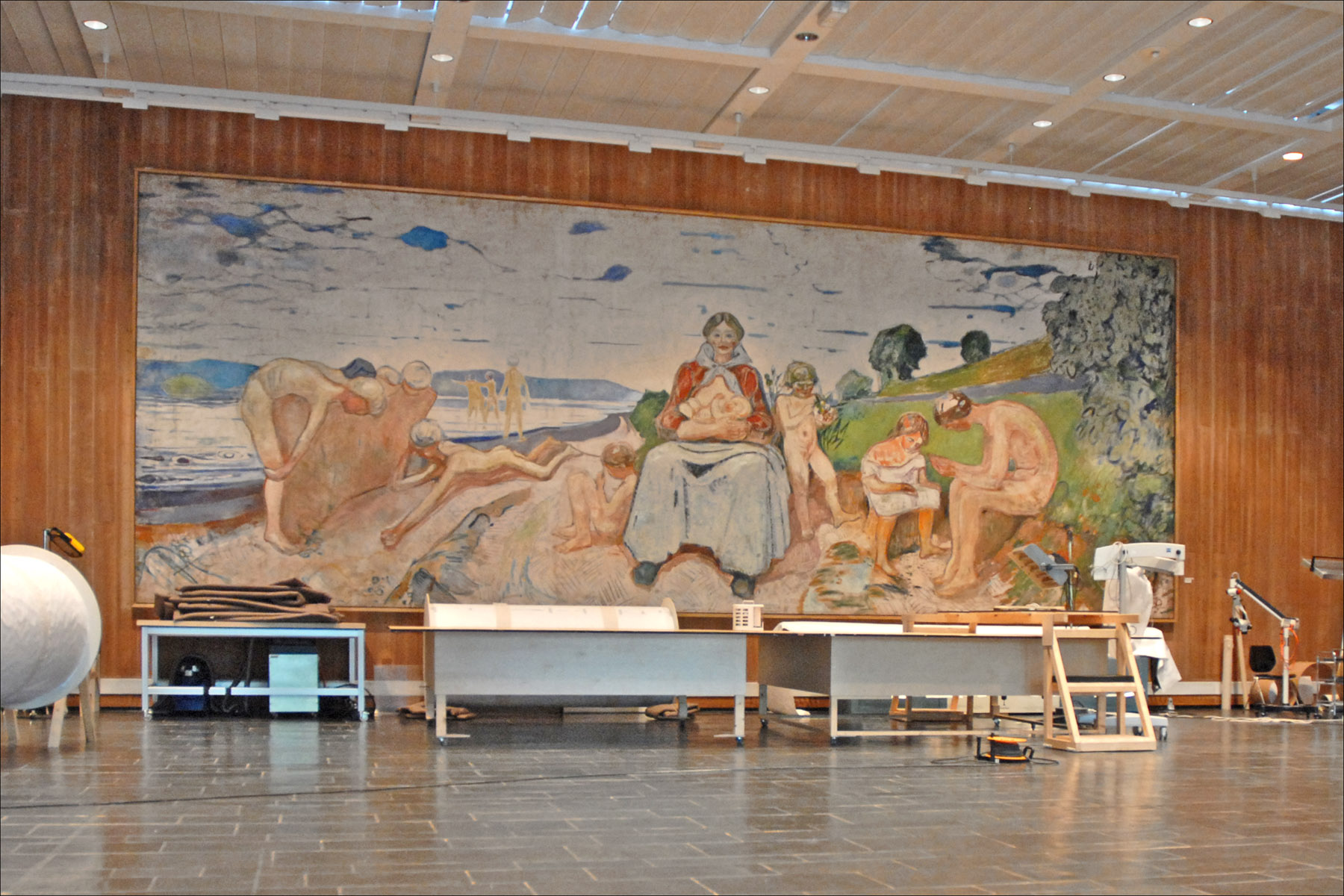 Salle de conférence du musée servant temporairement d'atelier de restauration des peintures de Munch conservées sur des rouleaux. Ces oeuvres étaient des travaux préparatoires à la décoration d'un hall de l'université d'Oslo qui avait été confiée à l'artiste fin 1909. La conservation de ces toiles nécessite une stabilisation et une consolidation de la couche picturale. L'oeuvre exposée est intitulée "Alma Mater" et date de 1912-1913.